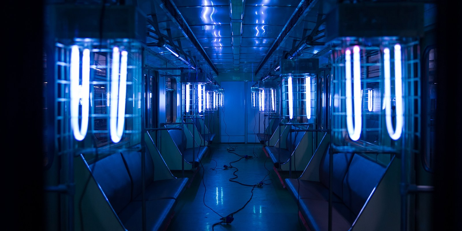 Дезинфекция поездов и тоннелей в московском метро